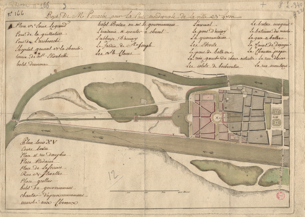 Plan du projet d'aménagement du sud de la Presqu’île, dessiné par Michel Perrache en 1770